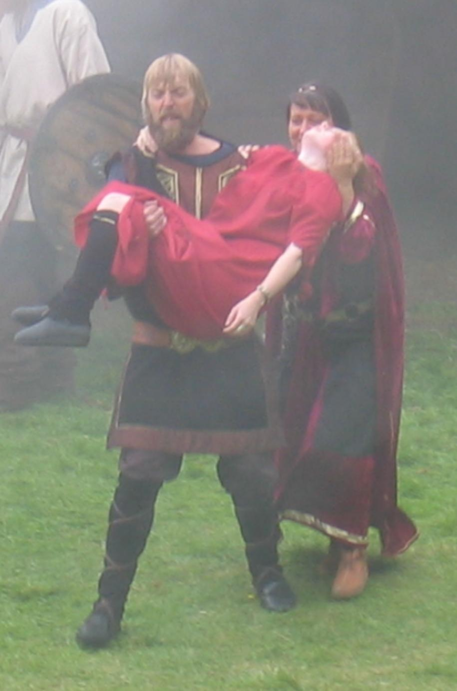 Steigen Sagaspill 2005 Signe er død, og sigard kommer bærende ut med henne fra soveburet. Bilde tatt av Marie Pedersen med Bruker:ThorRune's kamera.